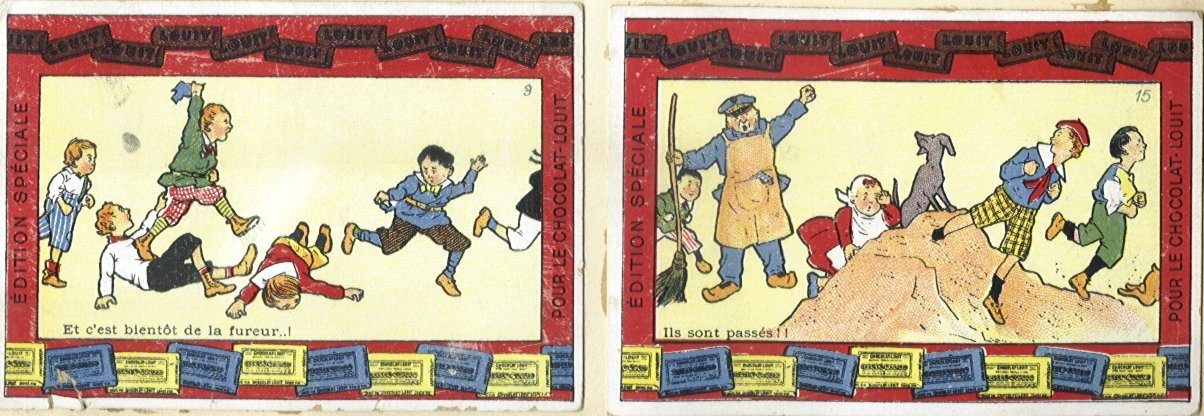 Image publicitaire du chocolat Louit (vers 1910) Collection personnelle